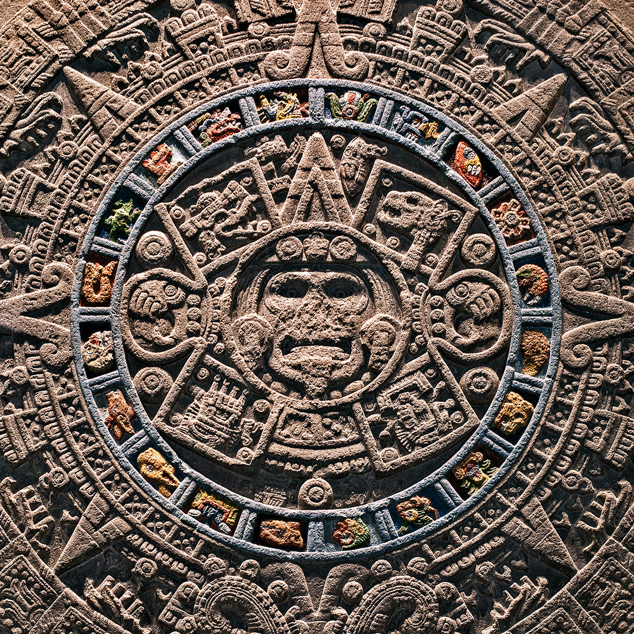 Les 20 signes du Tonalpohualli gravés sur La Pierre du Soleil. Colorisation libre (original : Musée National d'Anthropologie, Mexico).